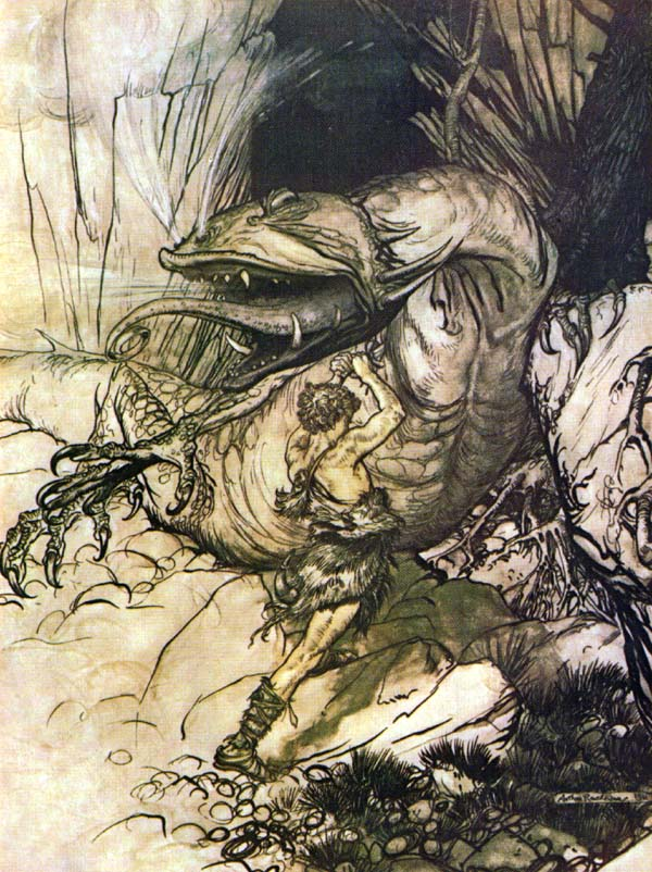 Siegfried slays Fafner.